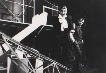 Cezmi Baskın Ibsen'in Bir Halk Düşmanı oyununda. YönetenYılmaz Onay